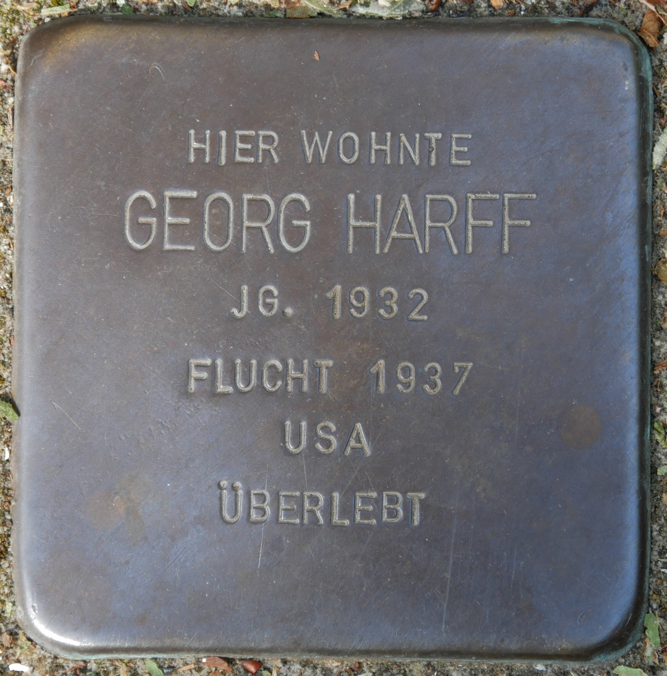 Stolpersteine Wesel: Harff, Georg